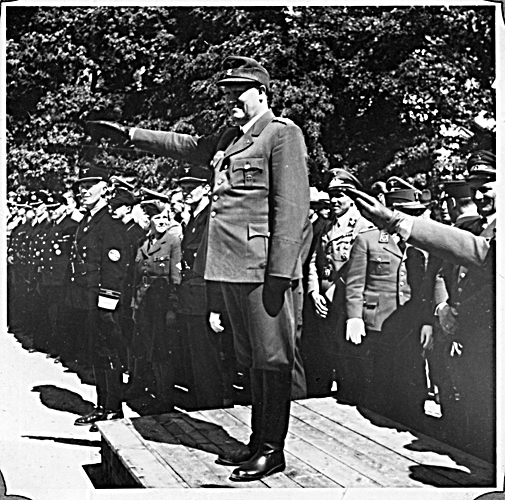 RA/PA-0750/Gk/0001 (album) 1116